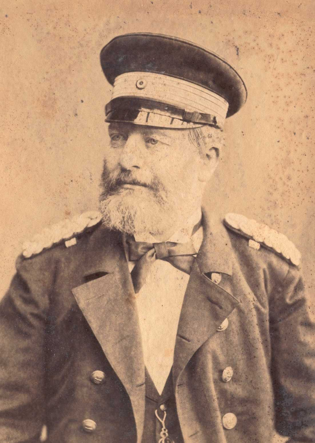 Fotografie des deutschen Marineoffiziers Paul Freiherr von Reibnitz (1838-1900)